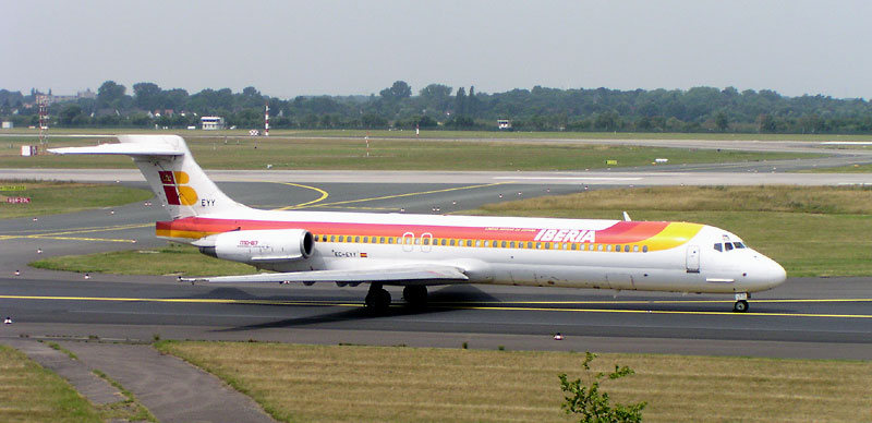 Eine McDonnell Douglas MD-87 der Iberia am 11. Juli 2003 in Düsseldorf.